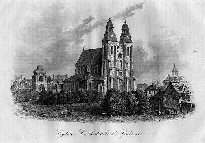 Eglise Cathédrale de Gnézne. Staloryt Auguste François Alésa. Z: Leonard Chodźko: La Pologne [...]. T.3. Paris 1839-1842.